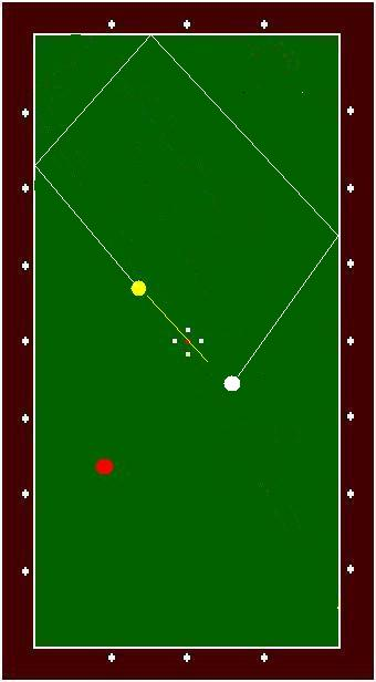 tiro biliardo 3 sponde